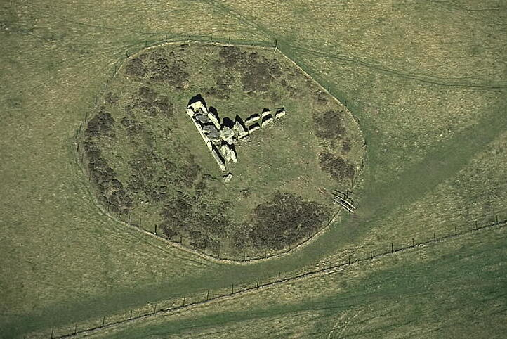 Gånggriften Girommen. Motiv: Ekornavallen Nyckelord: Flygbilder, Raä-Fastigheter, Riksintressen Kategori: Stenkammargrav Gånggriften Girommen.